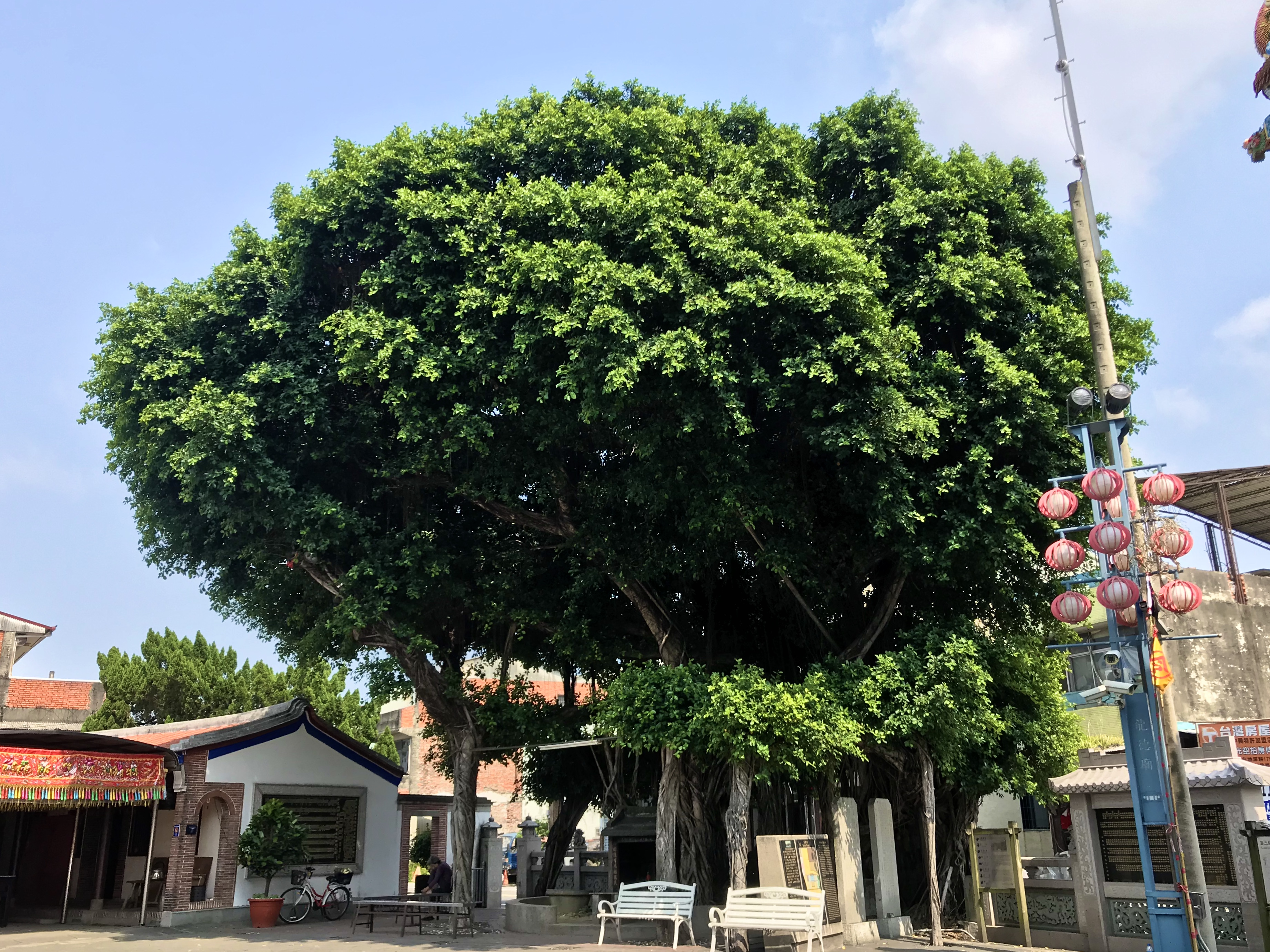 月眉厝榕樹公